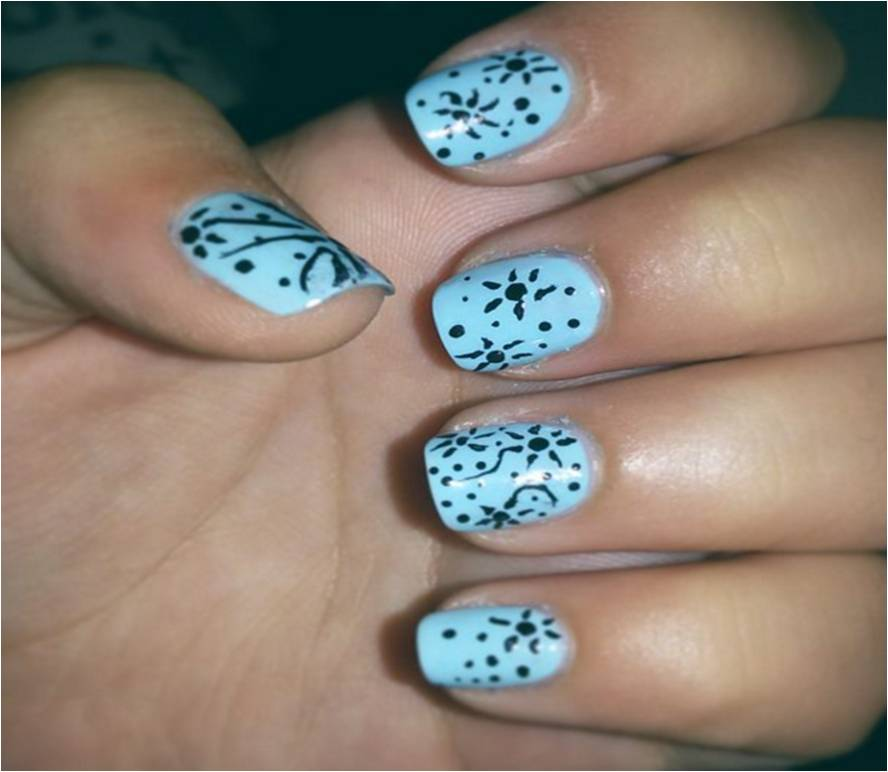 לק לציפורניים בגוון כחול כבסיס ומעליו ציורי פרחים